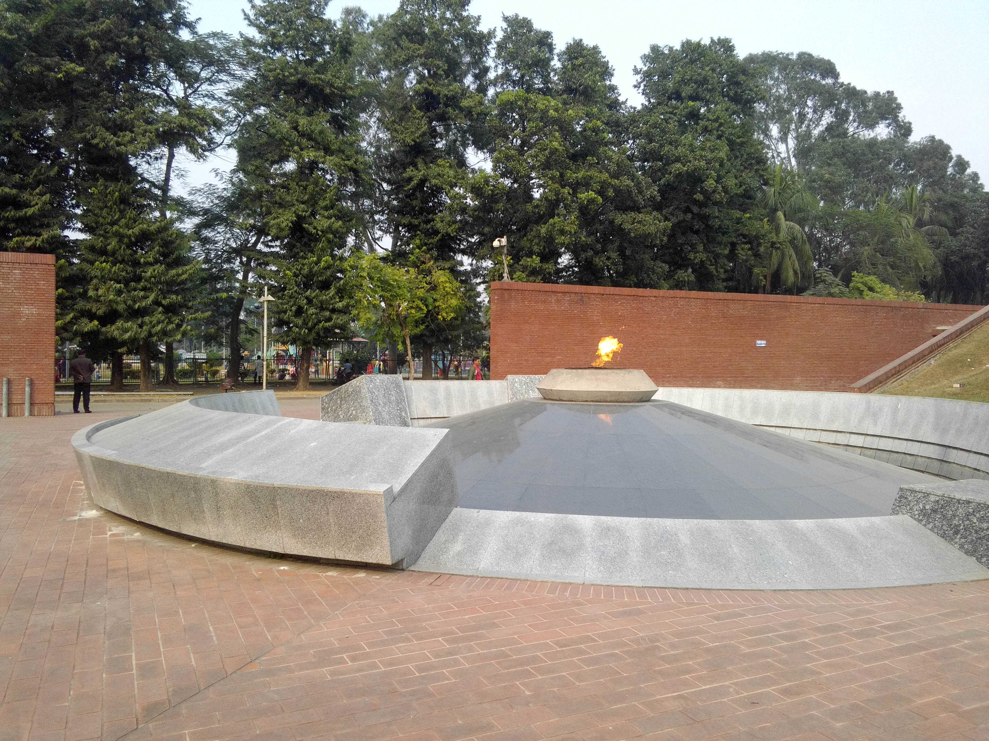 শিখা চিরন্তন রাজধানী ঢাকার সোহরাওয়ার্দী উদ্যানে অবস্থিত একটি স্মরণ স্থাপনা।